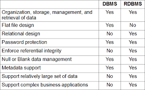 Монгол: DBMS ба RDBMS хоёрын ялгаа